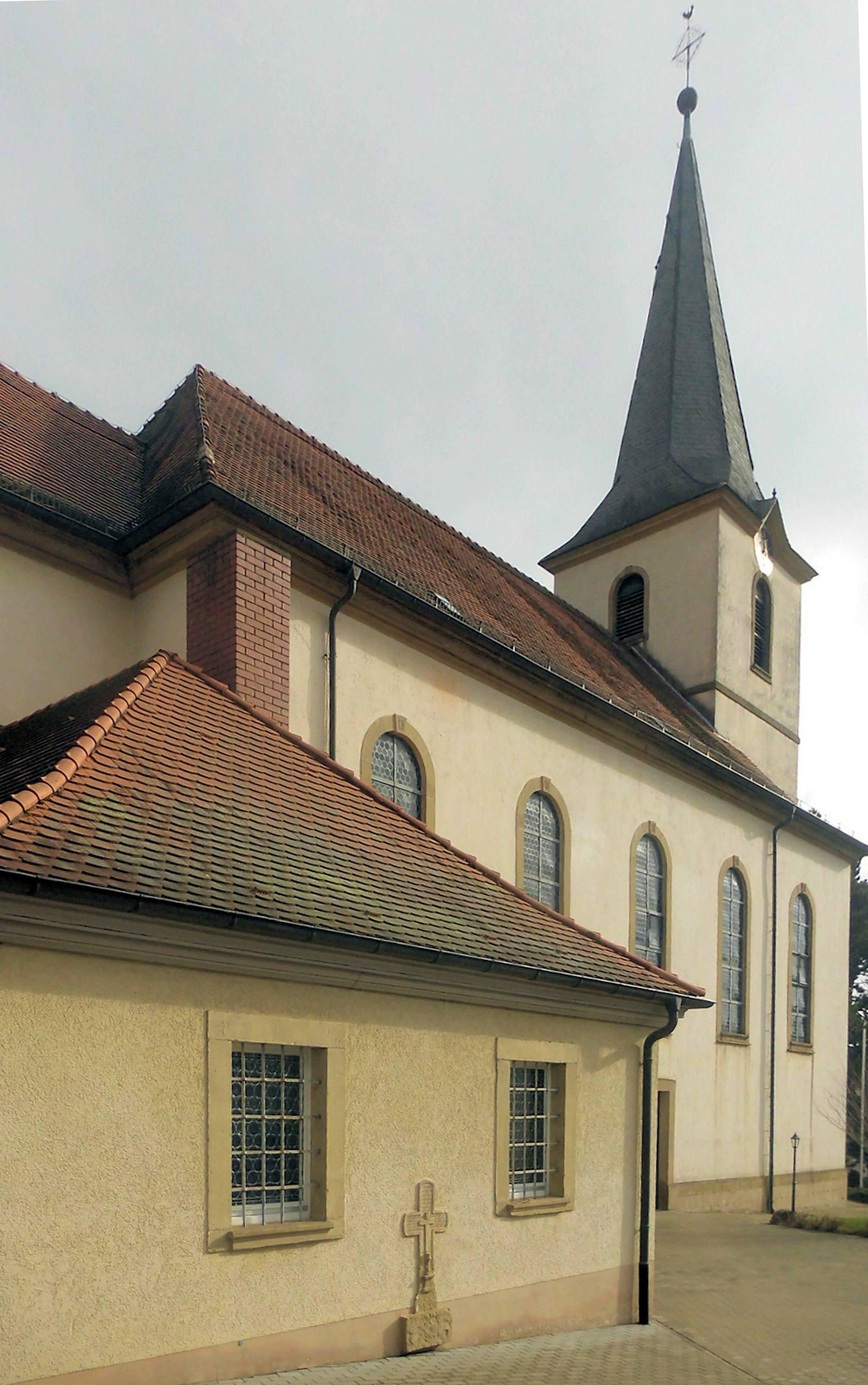 Kirche St. Peter in Bauerbach, Stadt Bretten, Landkreis Karlsruhe